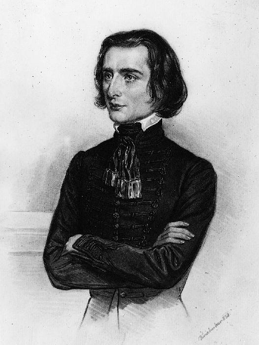 Liszt Ferenc (németül Franz Liszt; Doborján, 1811. október 22. – Bayreuth, 1886. július 31.) magyar zeneszerző, zongoraművész, karmester és zenetanár. A 19. századi romantika legjelentősebb magyar zeneszerzője és minden idők egyik legnagyobb zongoraművésze.